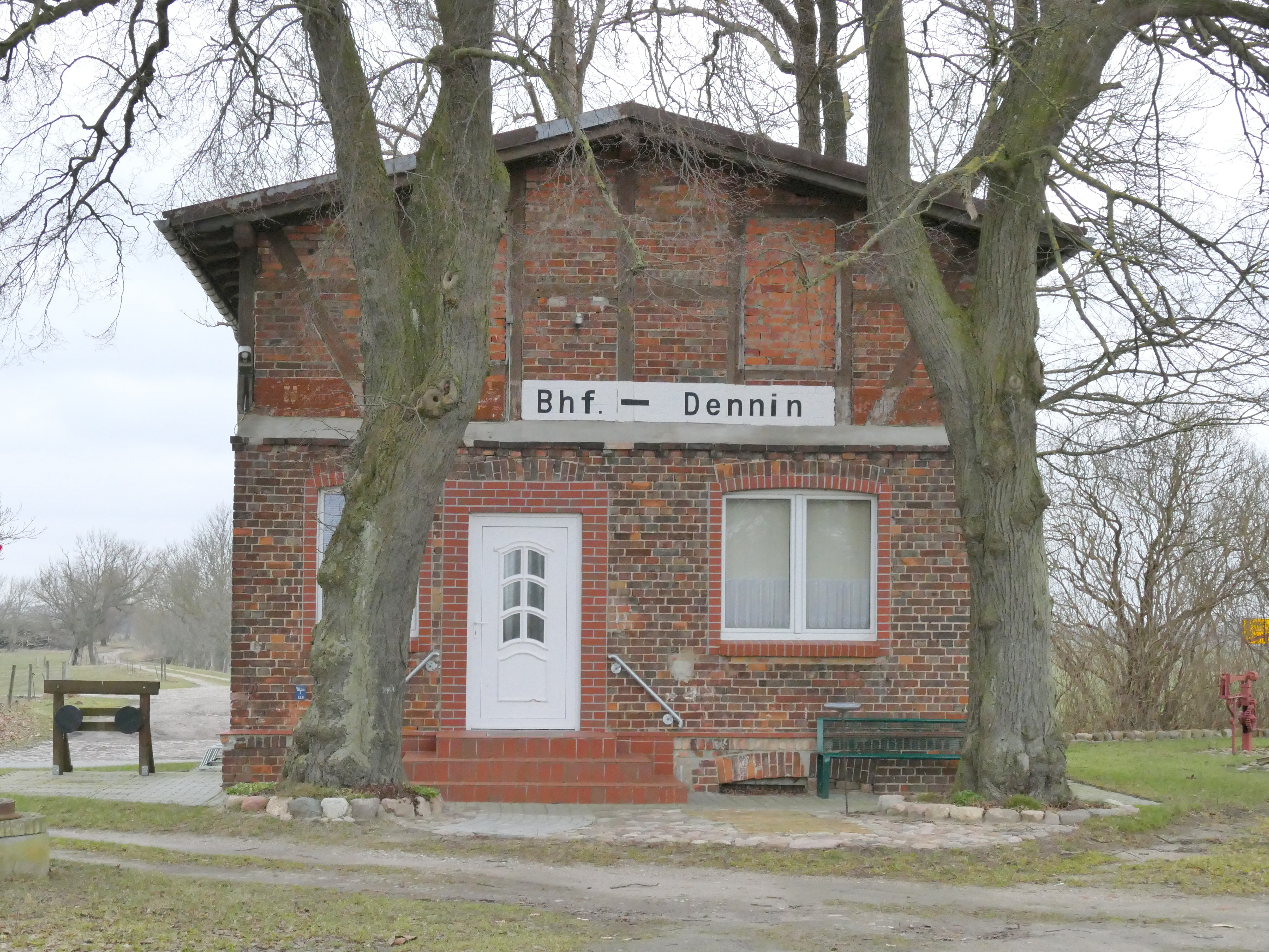 Ehemaliger Haltepunkt der Mecklenburg-Pommerschen Schmalspurbahn in Dennin, Gemeinde Spantekow